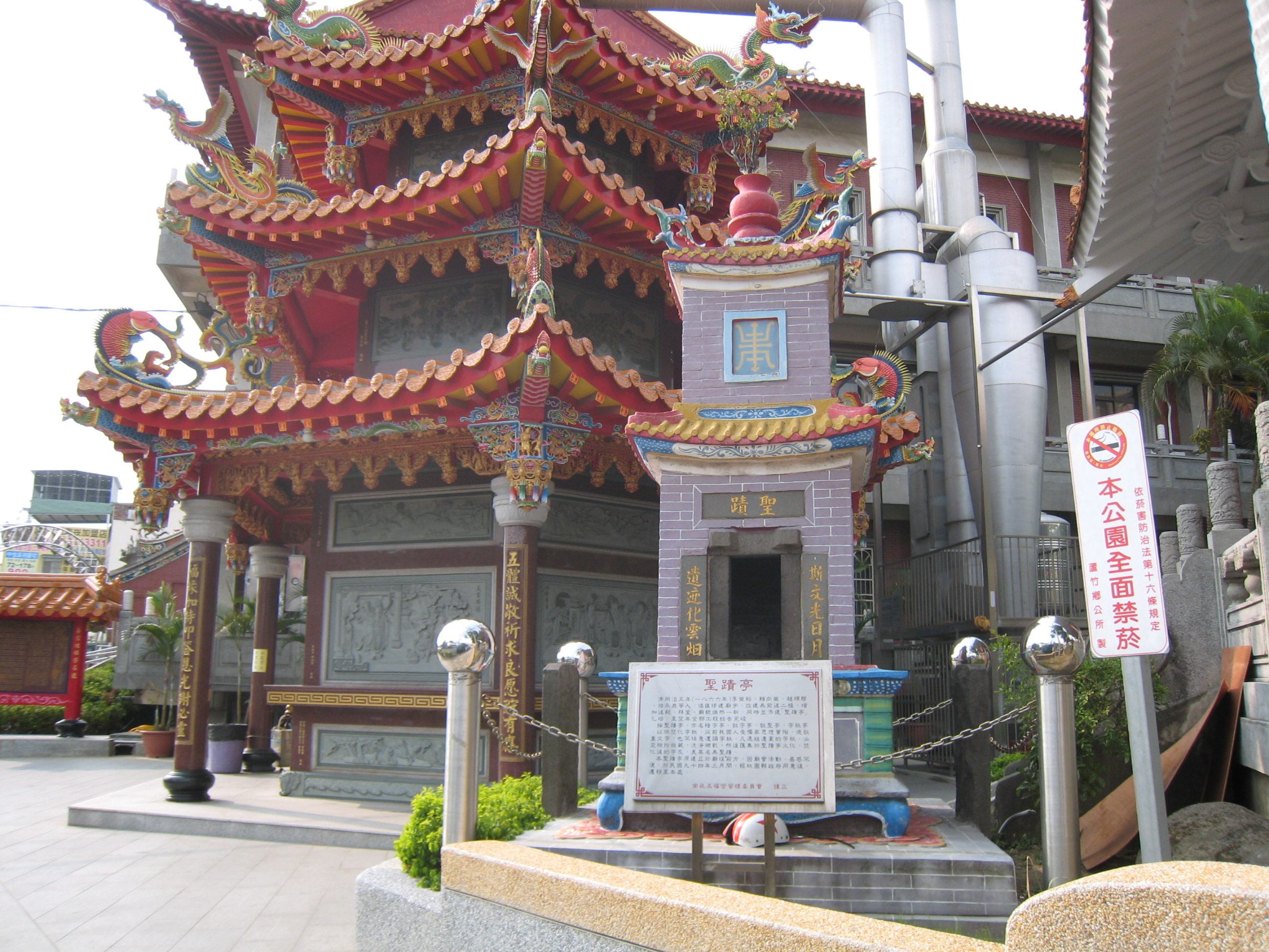 中文（台灣）: 南崁五福宮金爐(旁邊為聖蹟亭)